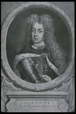 Josef I